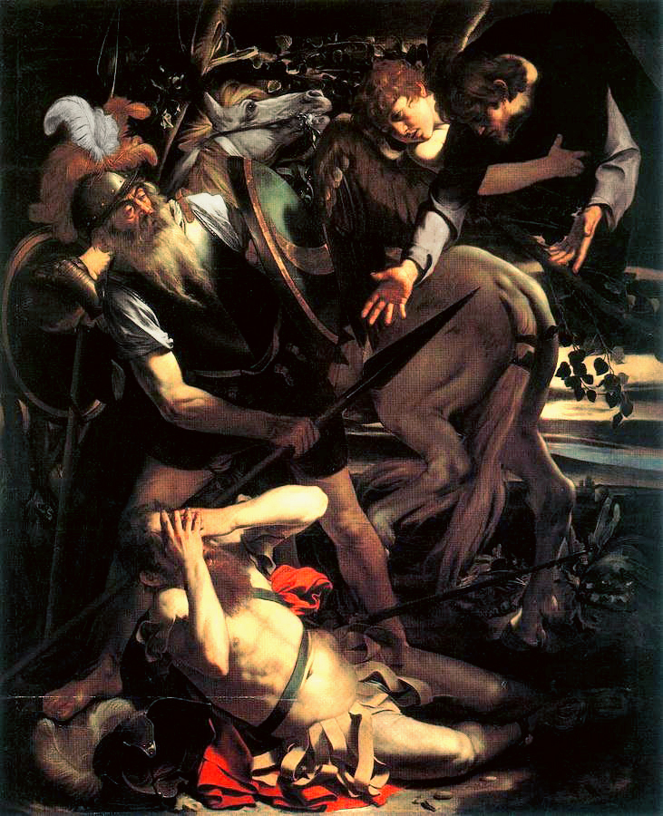 Conversione di San Paolo (Odescalchi)